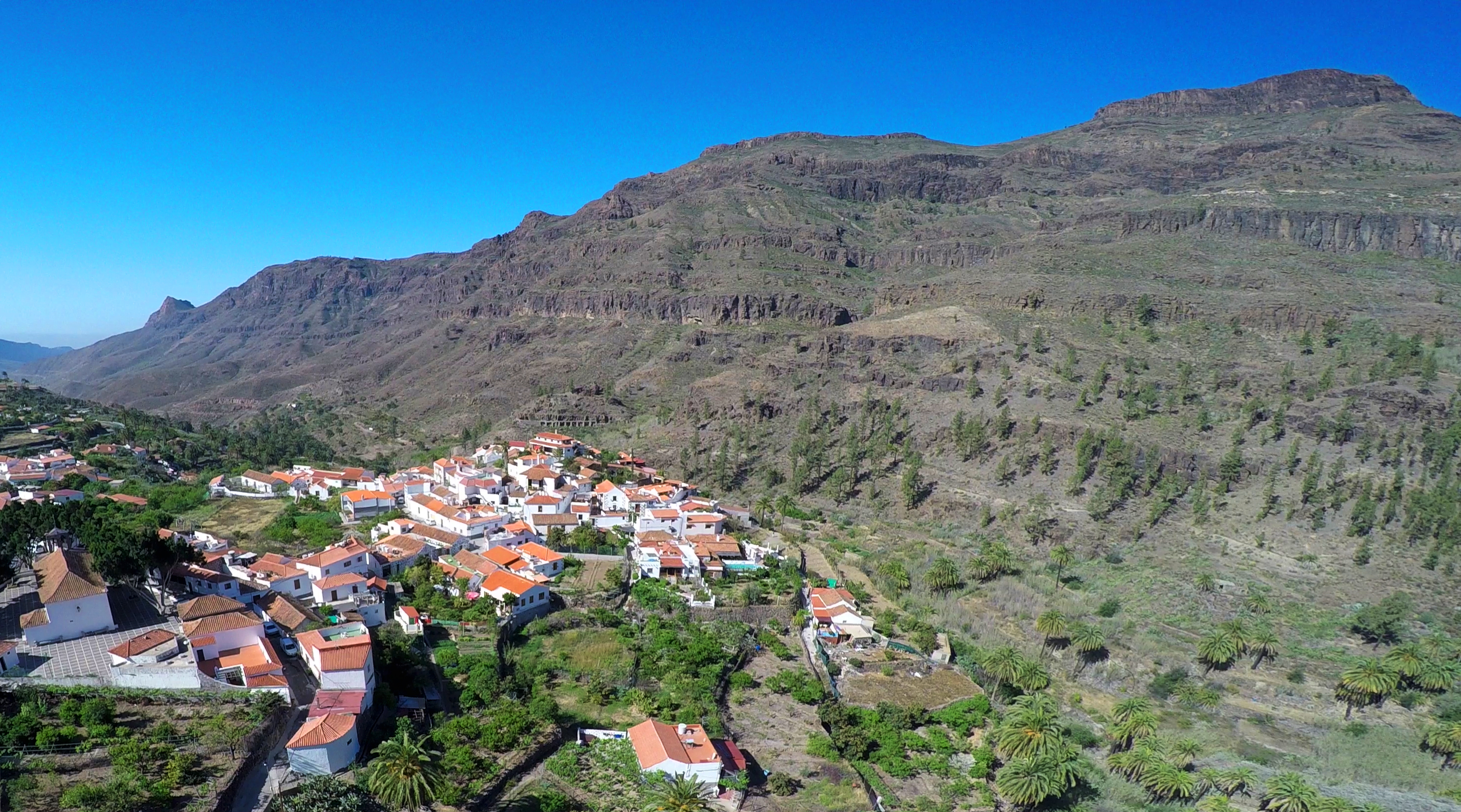 Paraje natural de Fataga This is a photography of a Site of Community Importance in Spain with the ID: ES7010025. Natura2000 entry, EEA entry